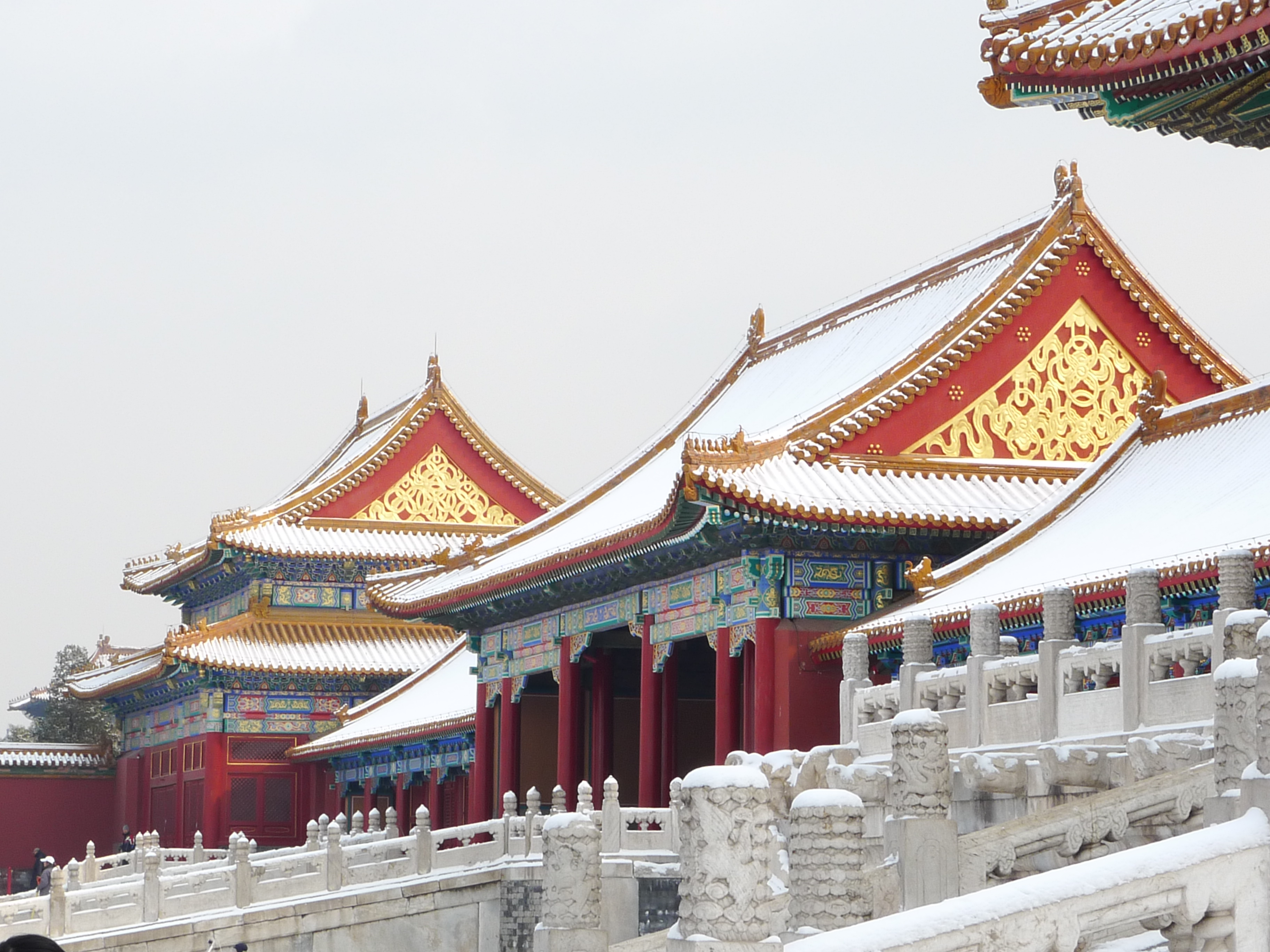 Forbidden City, Beijing